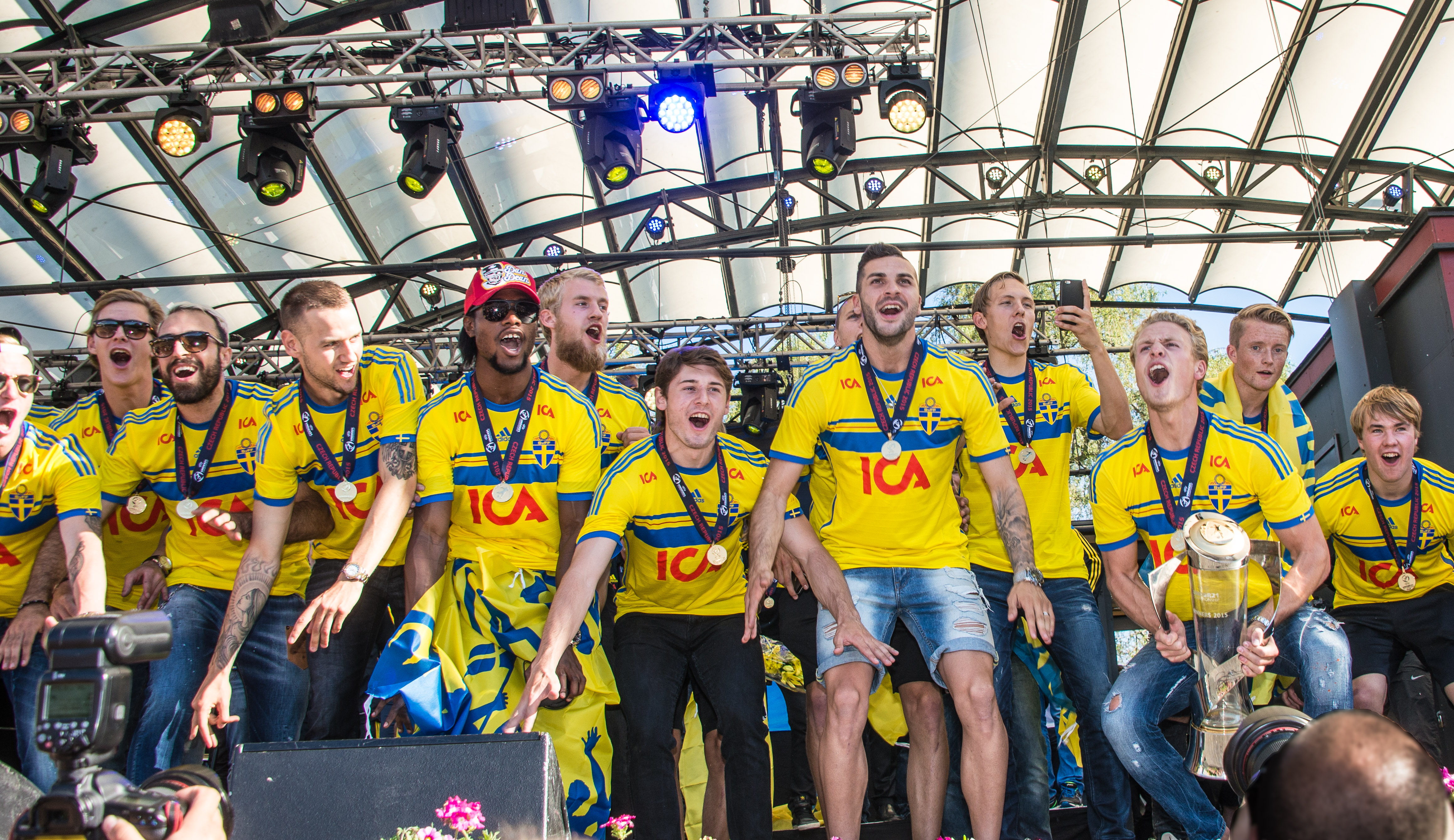 Sveriges U21-landslag blir hyllade i Kungsträdgården i Stockholm den 1 juli av 1000-tals fans efter guldet i U21-Europamästerskapet i fotboll 2015.